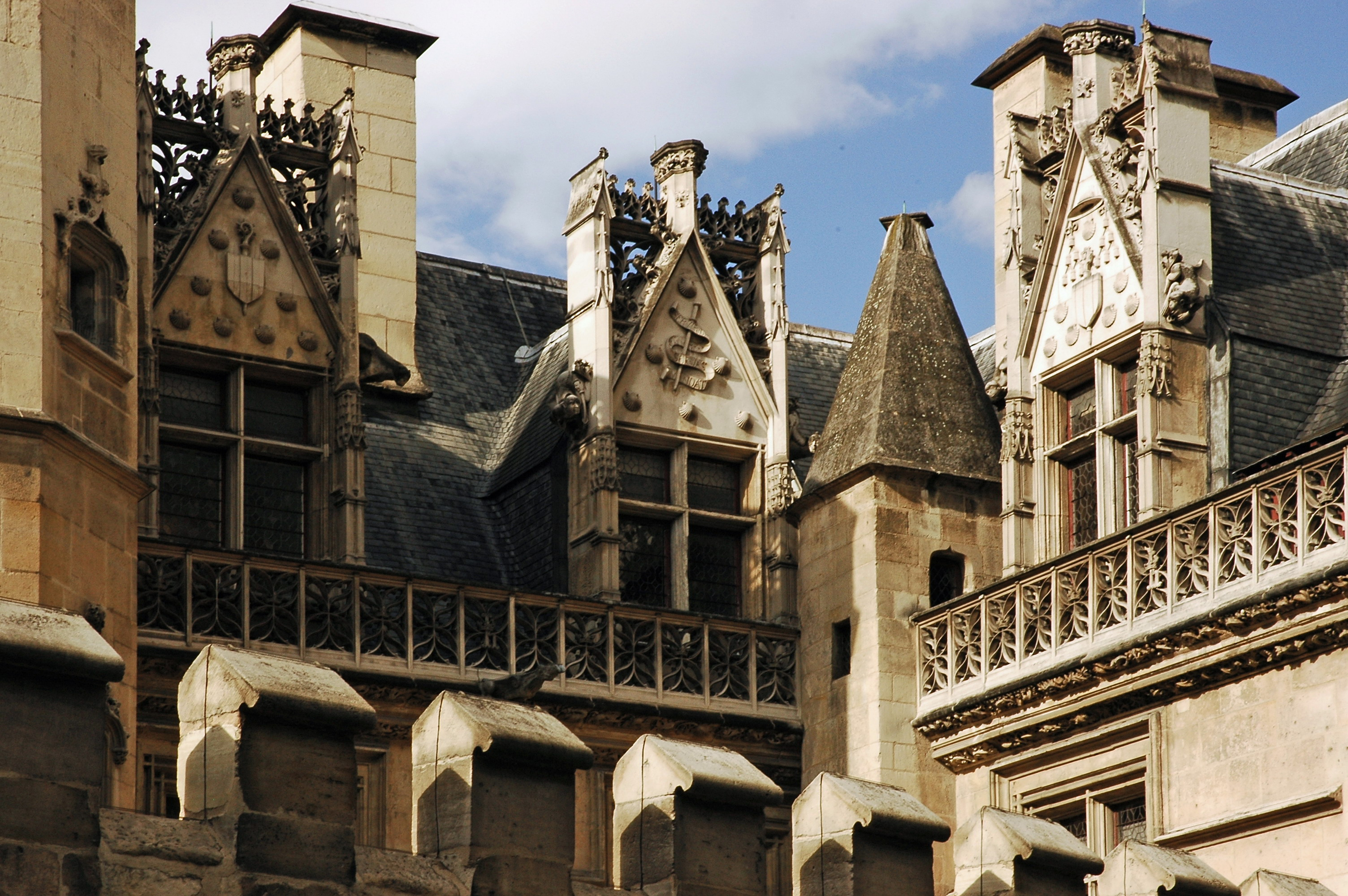 Hôtel des abbés de Cluny